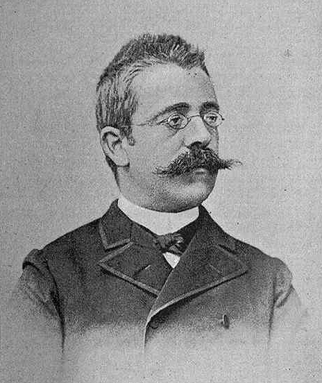 Retrato de Ricardo Bellver, en La Ilustración Artística.